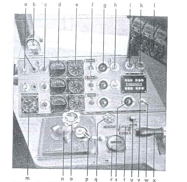 Führerpult von dem NEB T 4